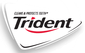 לוגו החברה